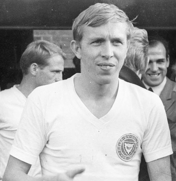 im Holsteinstadion. Im Bild u.a. Holsteins Manfred Podlich (Bildmitte).